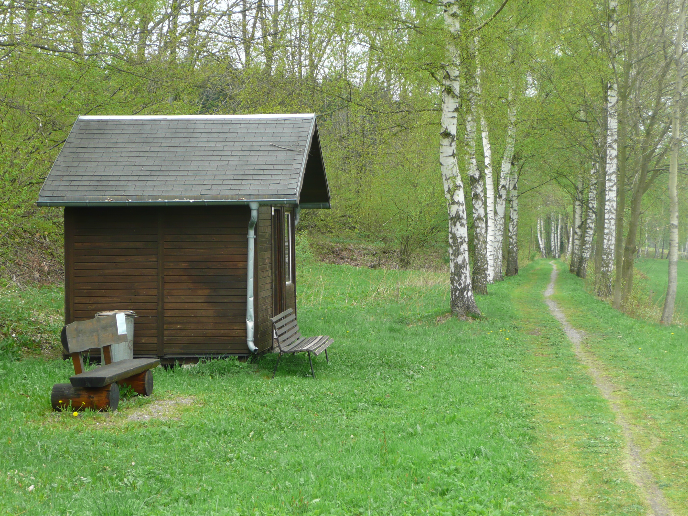 Foto der erhaltenen Haltestelle Unterfriedebach